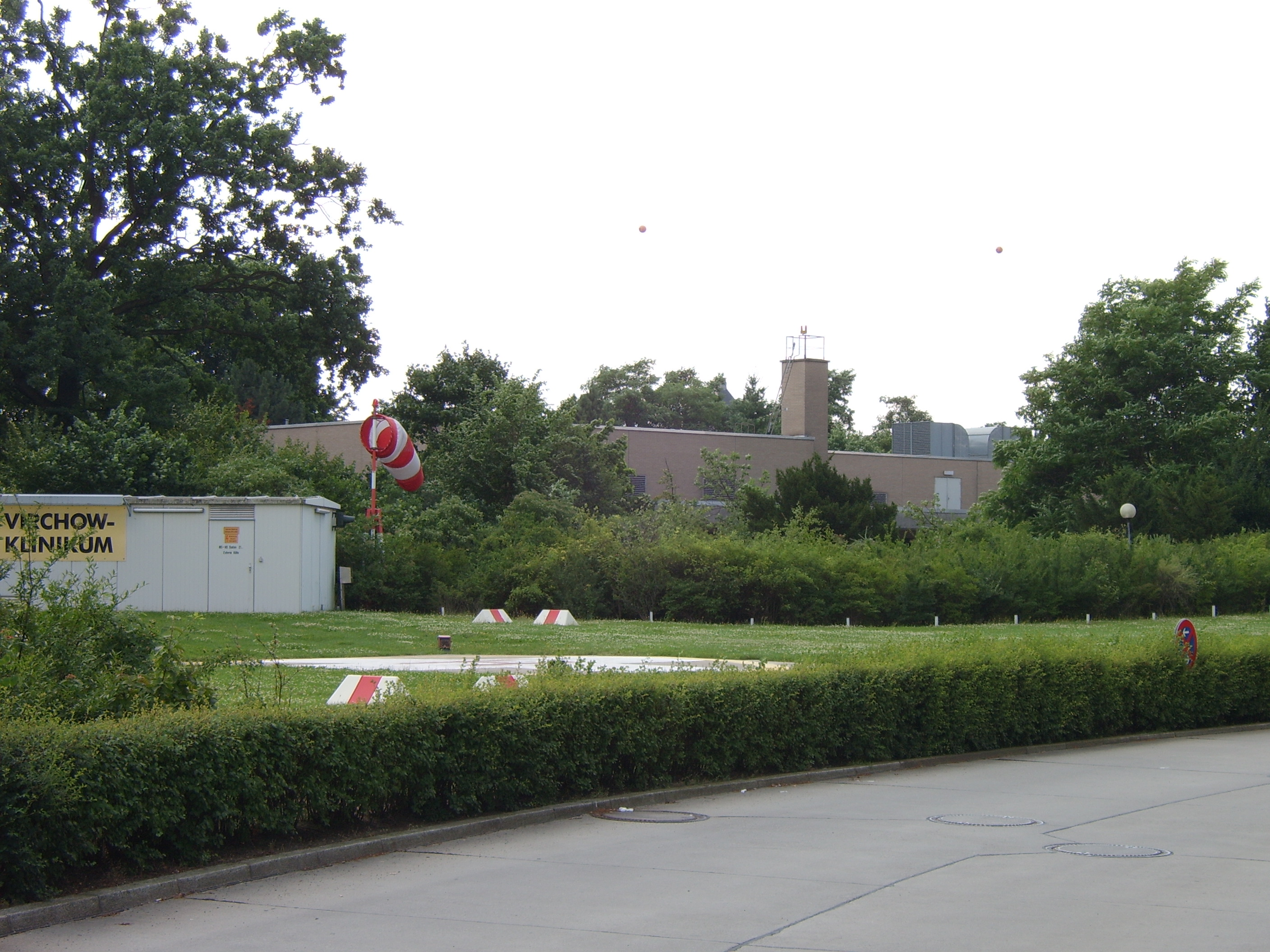 Isolierstation_CVK